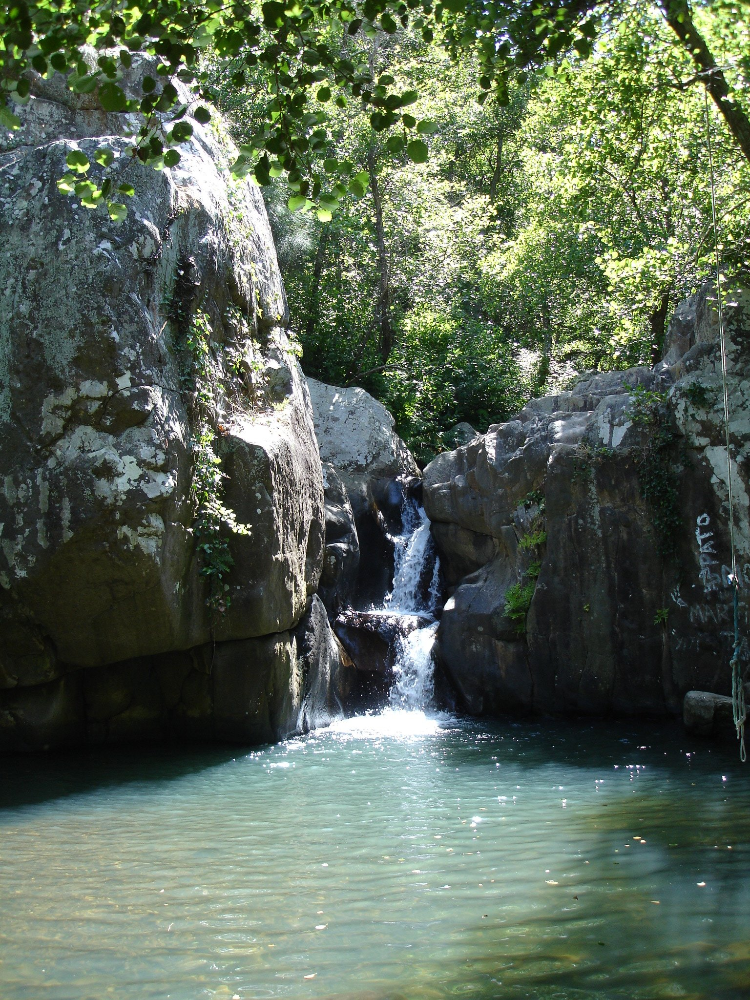 Río de la Miel. Parque Natural de los Alcornocales. Andalucía (España)